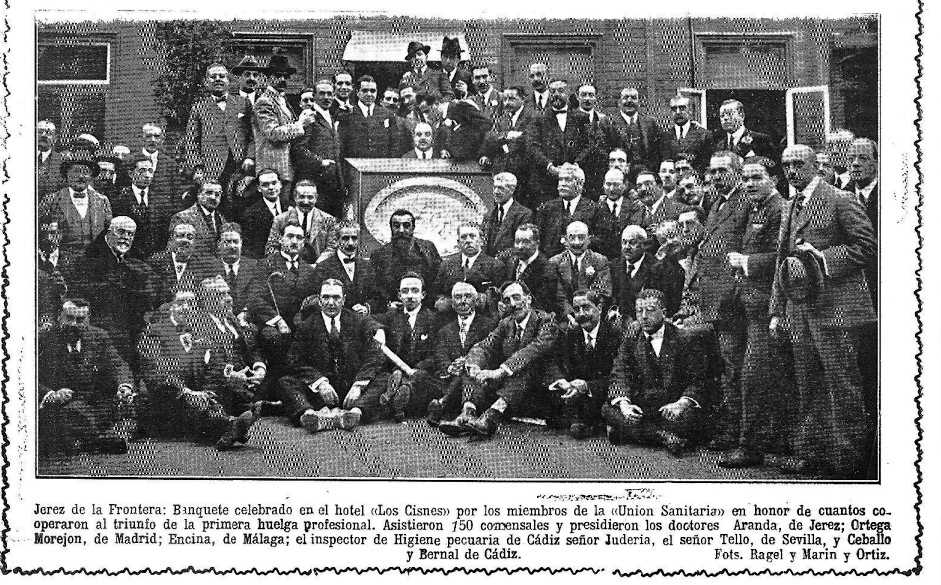 Jerez de la Frontera: Banquete celebrado en el hotel «Los Cisnes» por los miembros de la «Union Sanitaria» en honor de cuantos cooperaronal triunfo de la primera huelga profesional.